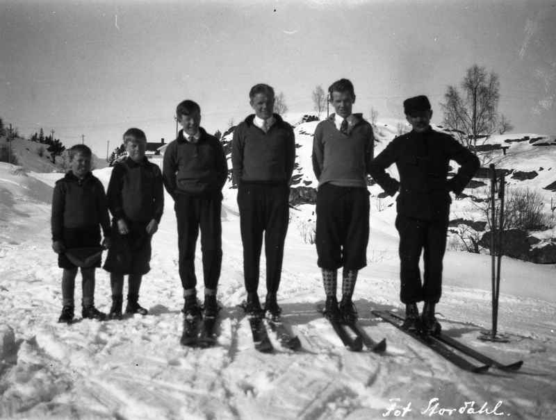 Skihopperfamilien Ruud fra Kongsberg på tur på Storåsen. Fra venstre: Asbjørn Ruud, Øyvind Ruud, Birger Ruud, Sigmund Ruud, Tormod Ruud, far Sigurd Ruud (kemner Ruud).